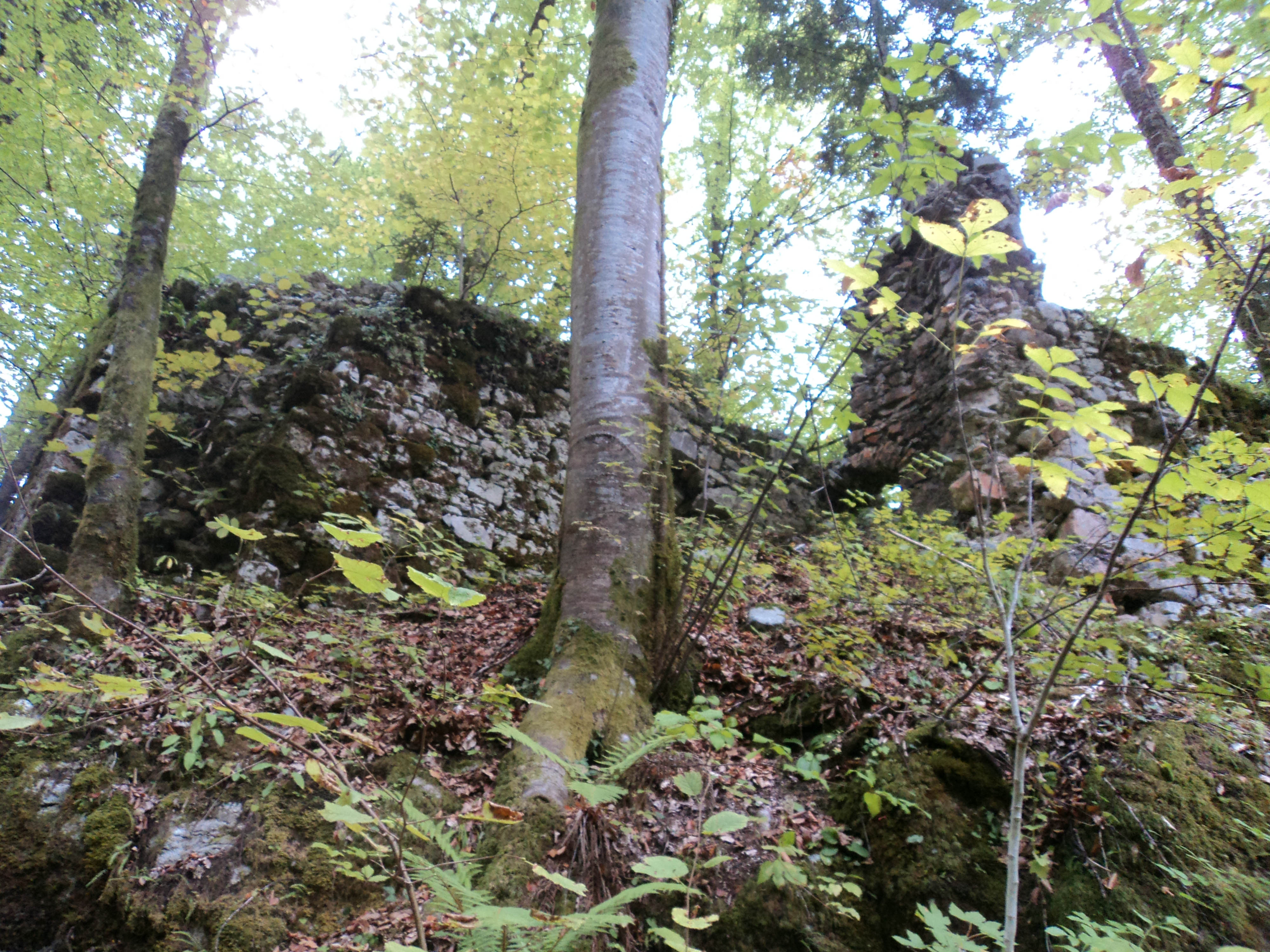 Grad Rožek 2011